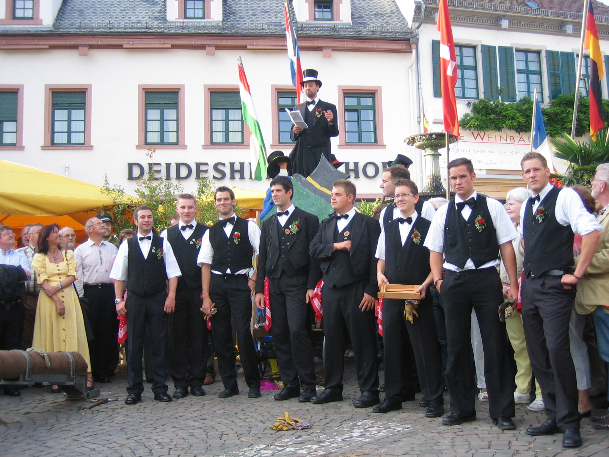 Bevor der Kerwebaum gestellt wird, hält bei der offiziellen Eröffnung der Deidesheimer Weinkerwe einer der Kerwebuwe die "Kerweredd", eine Rede in Reimform und Pfälzer Mundart, die das Ortsgeschehen des vergangenen Jahres glossiert und in der im Ort herrschende Missstände angeprangert werden. Eine derartige Rede, anderswo auch Kerwe- oder Straußpredigt genannt, ist in vielen pfälzischen Orten Brauch. Vielfach werden nach alter Traditionen derartige Kerwereden von Junggesellen vorgetragen, denn schon früher durfte in einer solchen Rede die Obrigkeit eines Ortes kritisiert werden und es sollte nicht eine ganze Familie unter etwaigen Repressalien zu leiden haben.